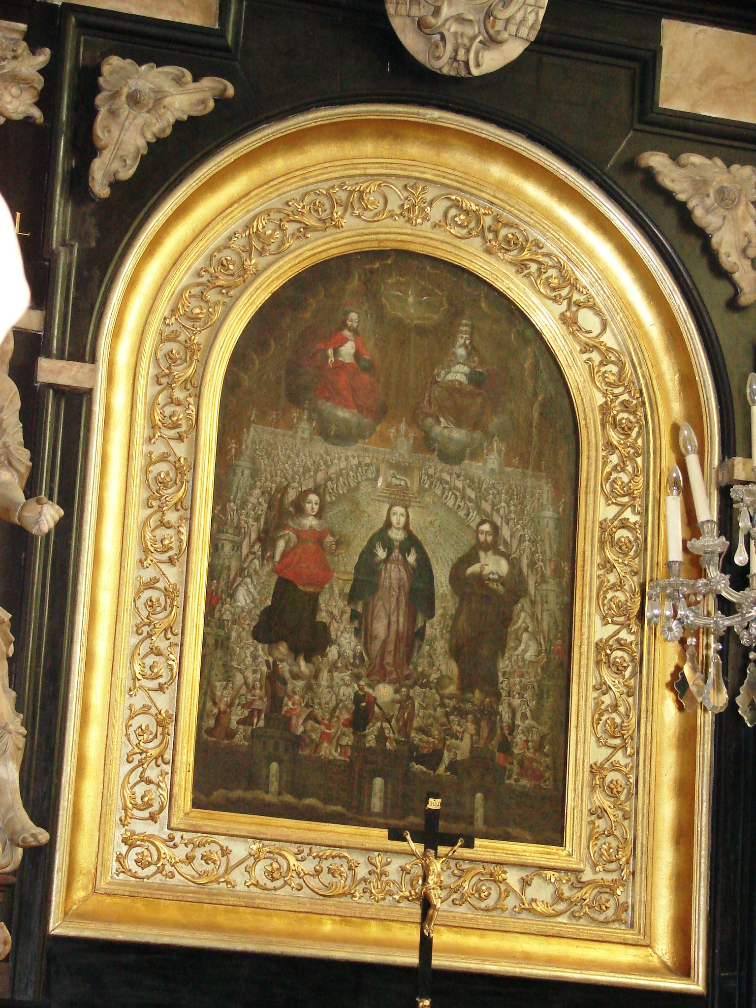 Krzysztof Boguszewski, Niebieskie Jerusalem, Poznań Archcathedral Basilica